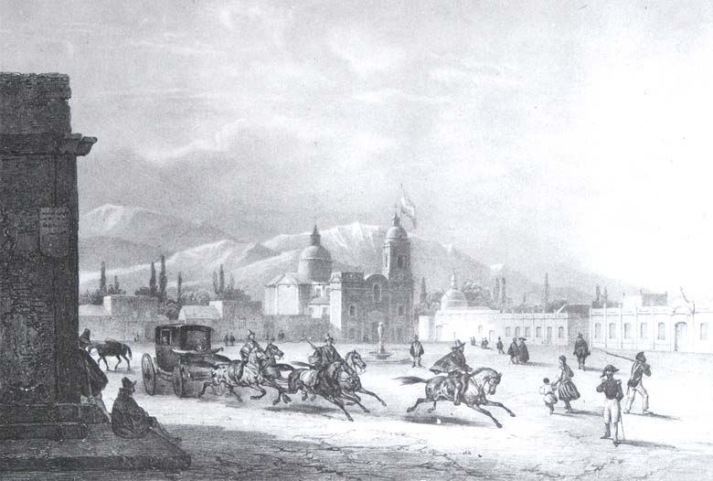 Plaza de Mendoza